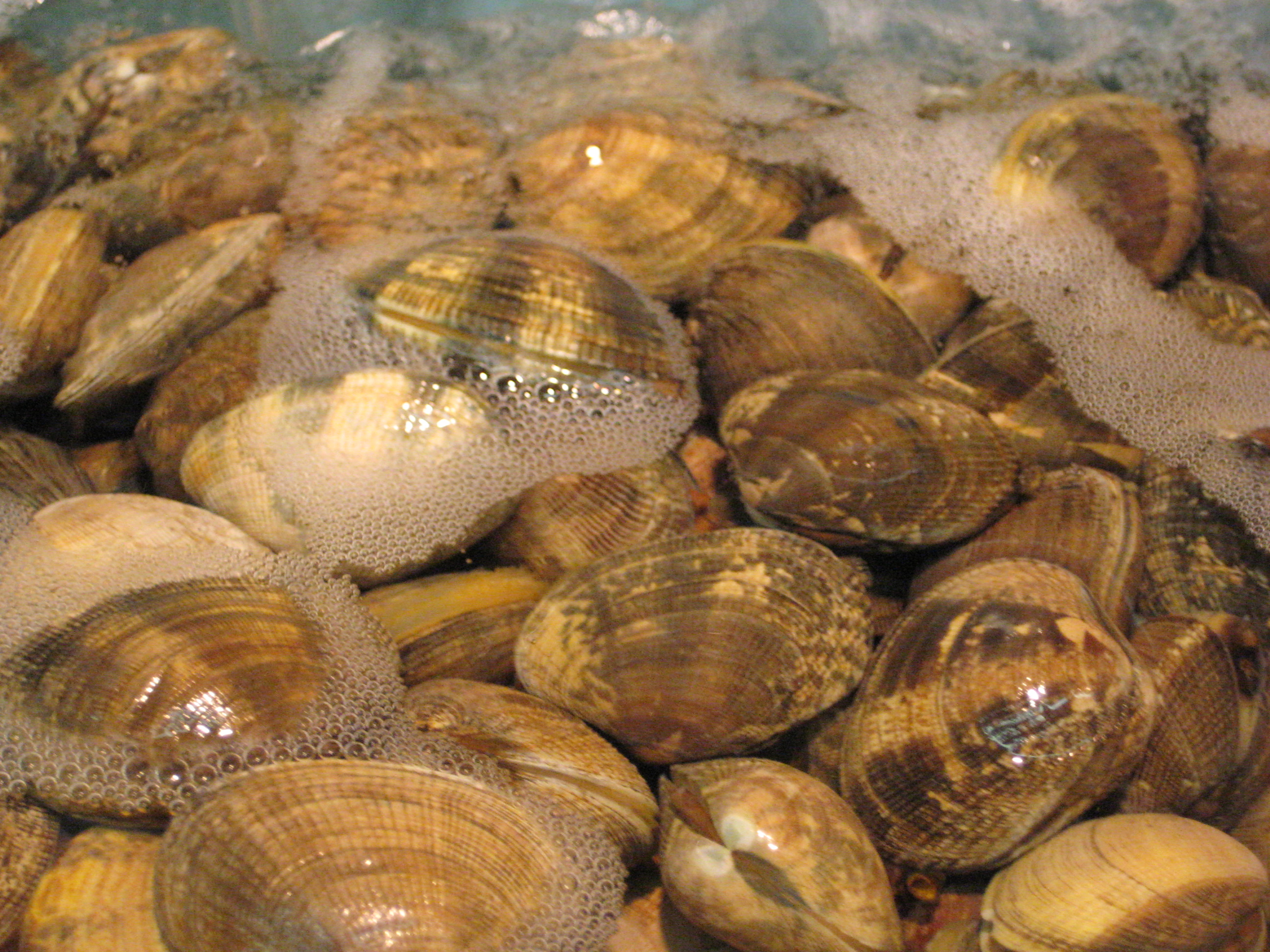 Clams